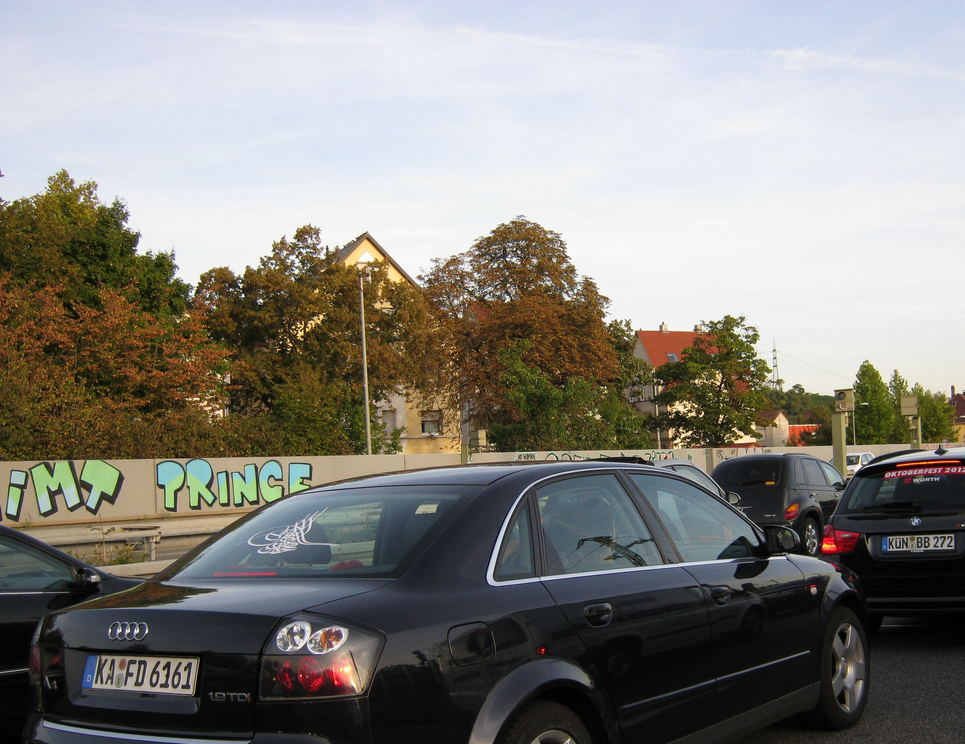 Der tägliche Stau vor dem Ende der vierspurigen B 10/ B 27 in Stuttgart-Zuffenhausen